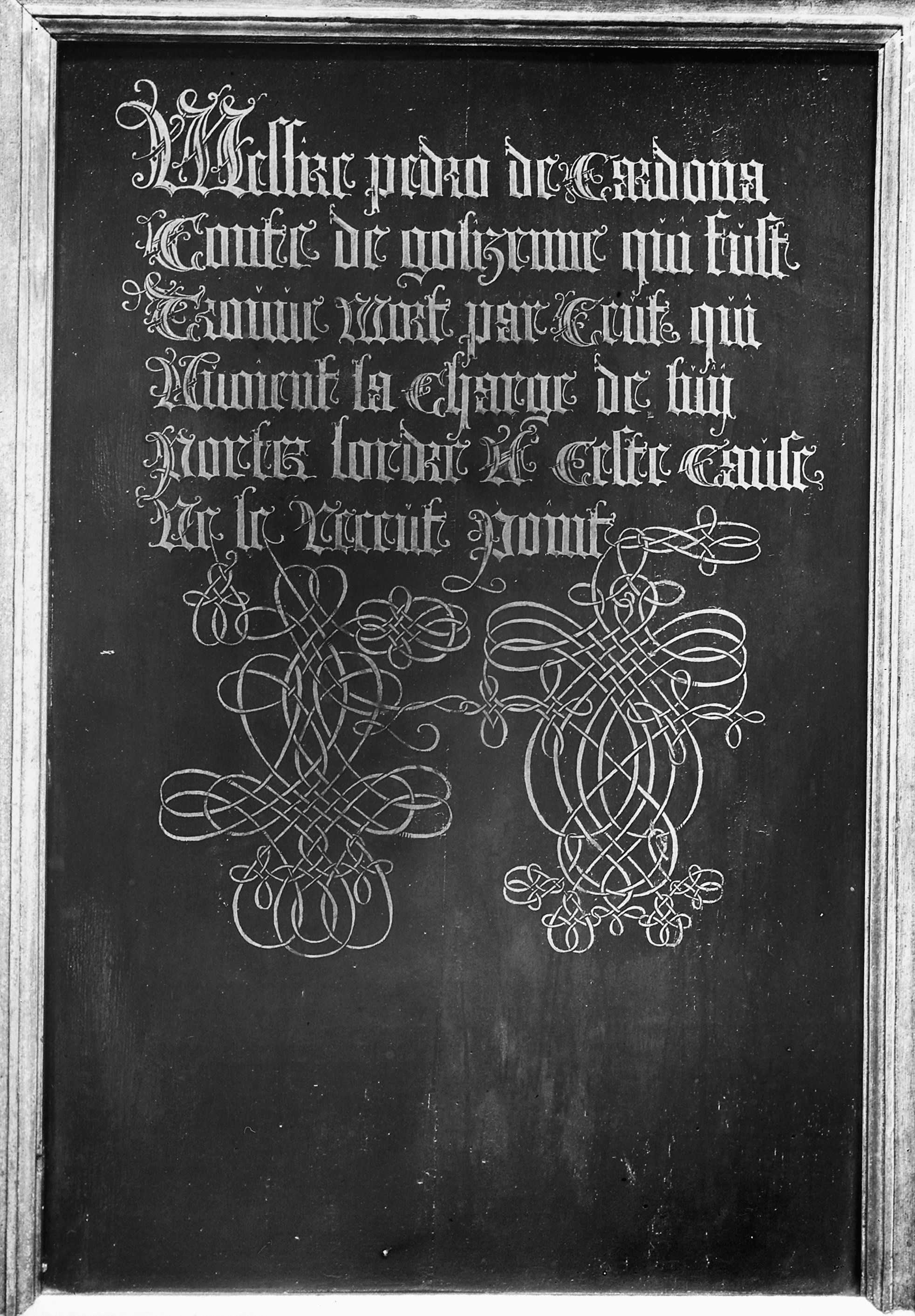 Sint Jacobskerk: Interieur priesterkoor, wapenbord Ridder Gulden Vlies, Pedro de Cardona